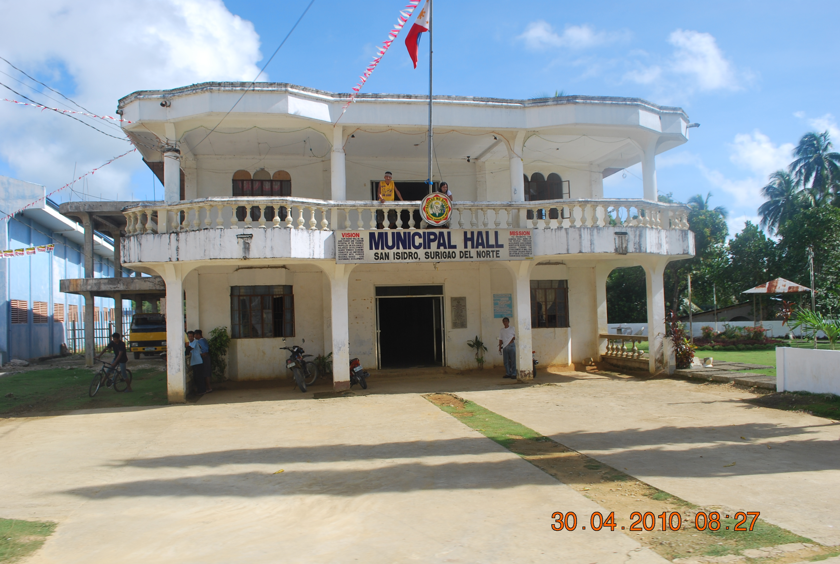 Municipal Building